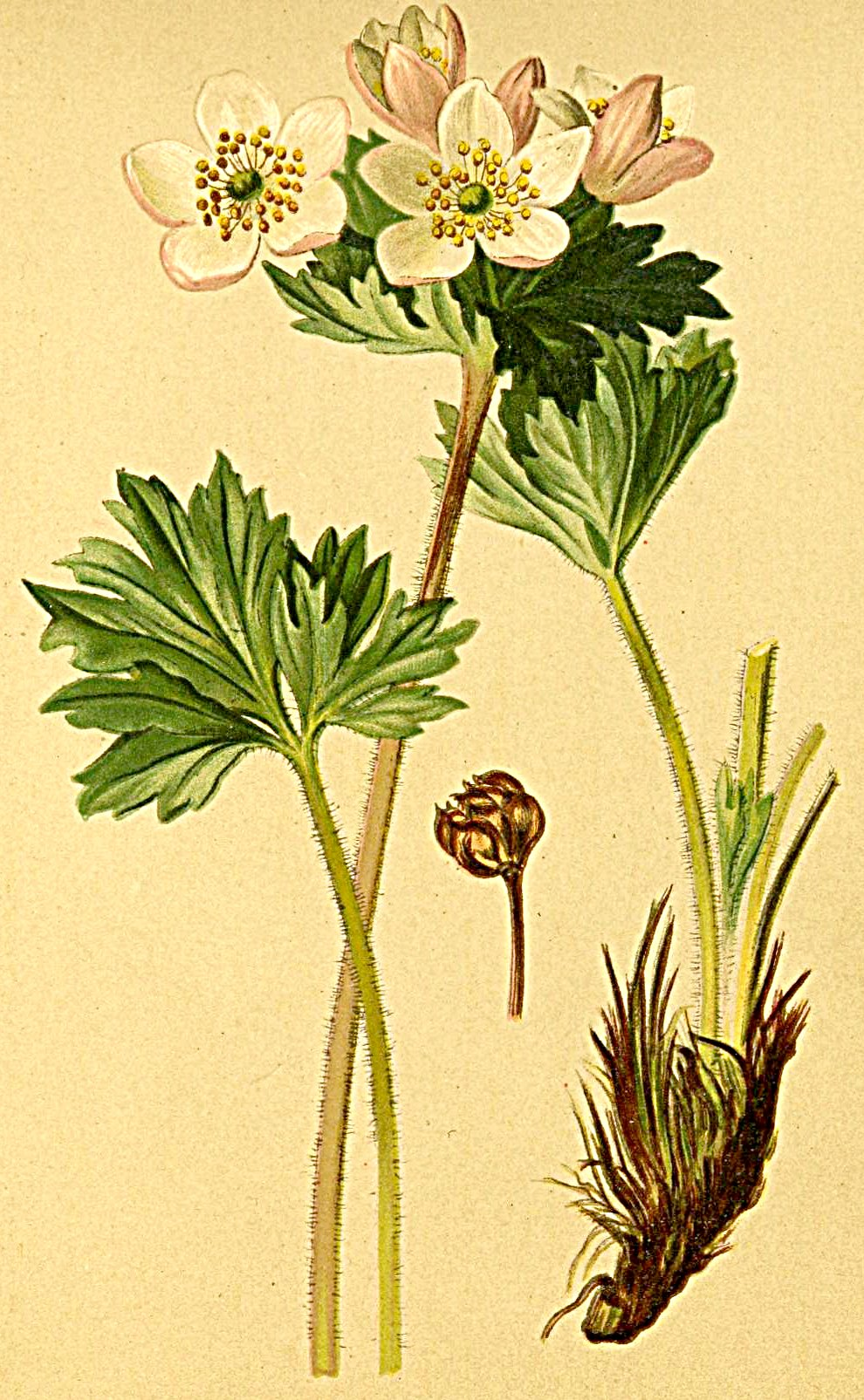 Anemone narcissifolia (Anemone narcissiflora)